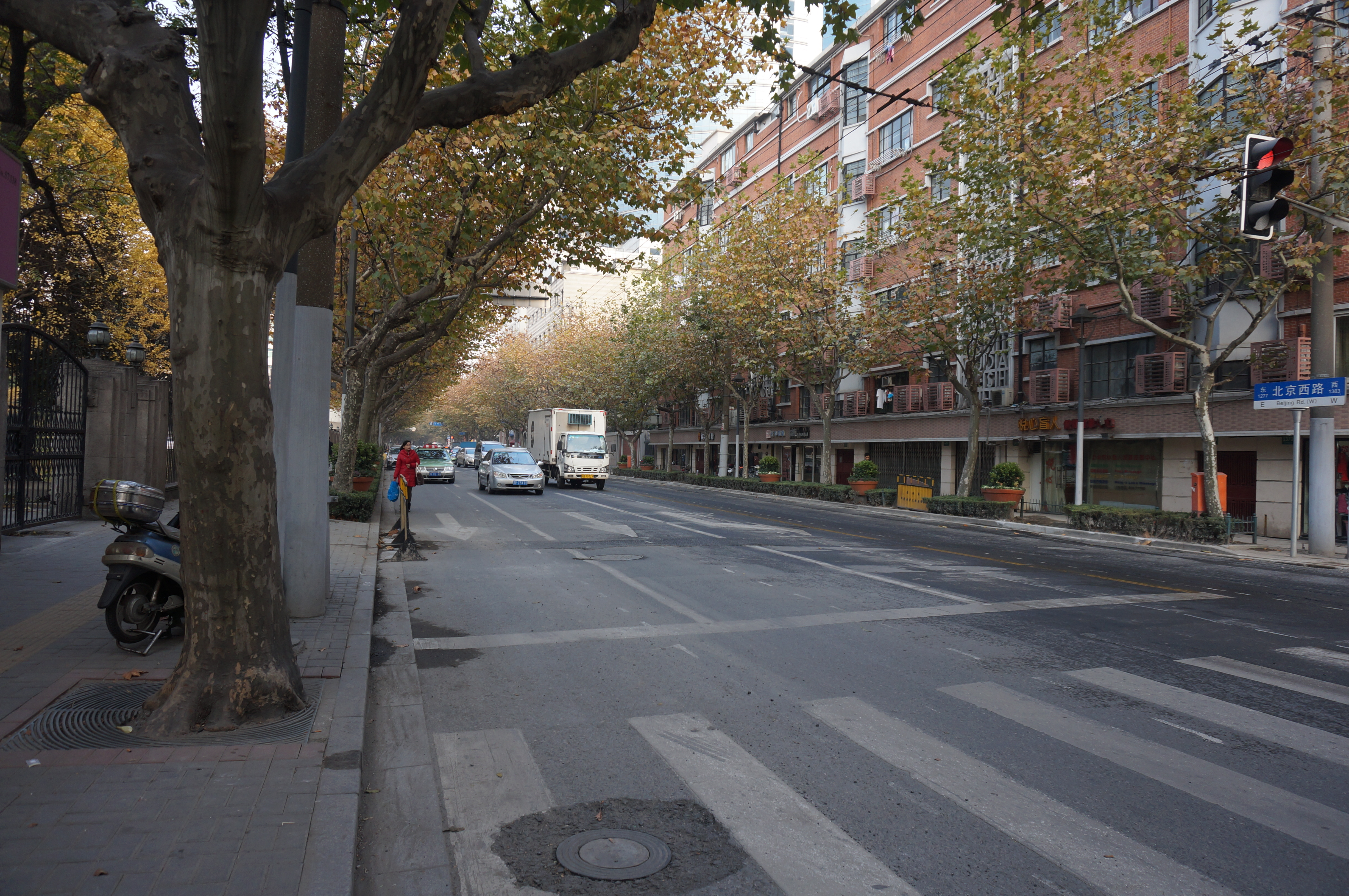 上海北京西路街景